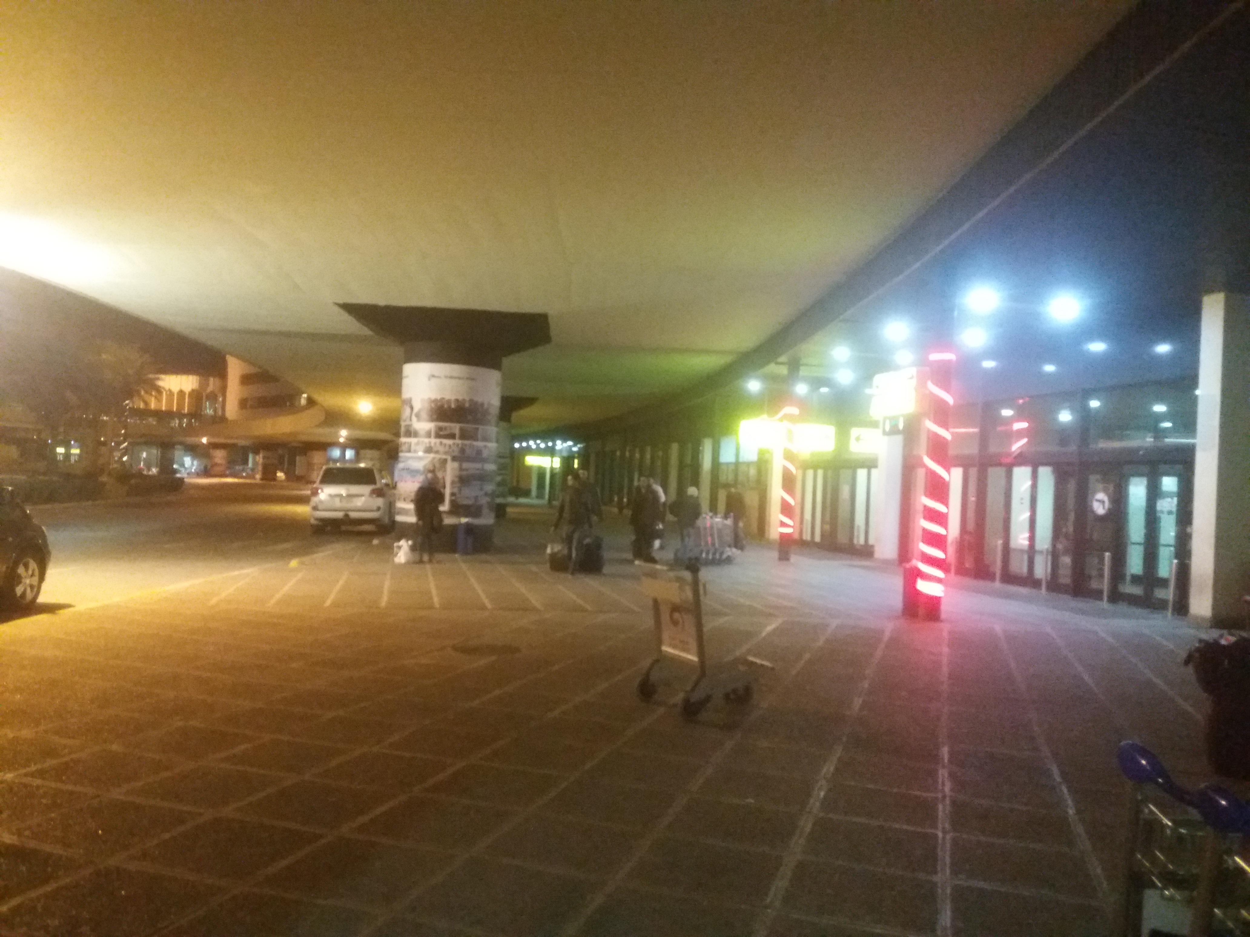 Baghdad International Airport 2017